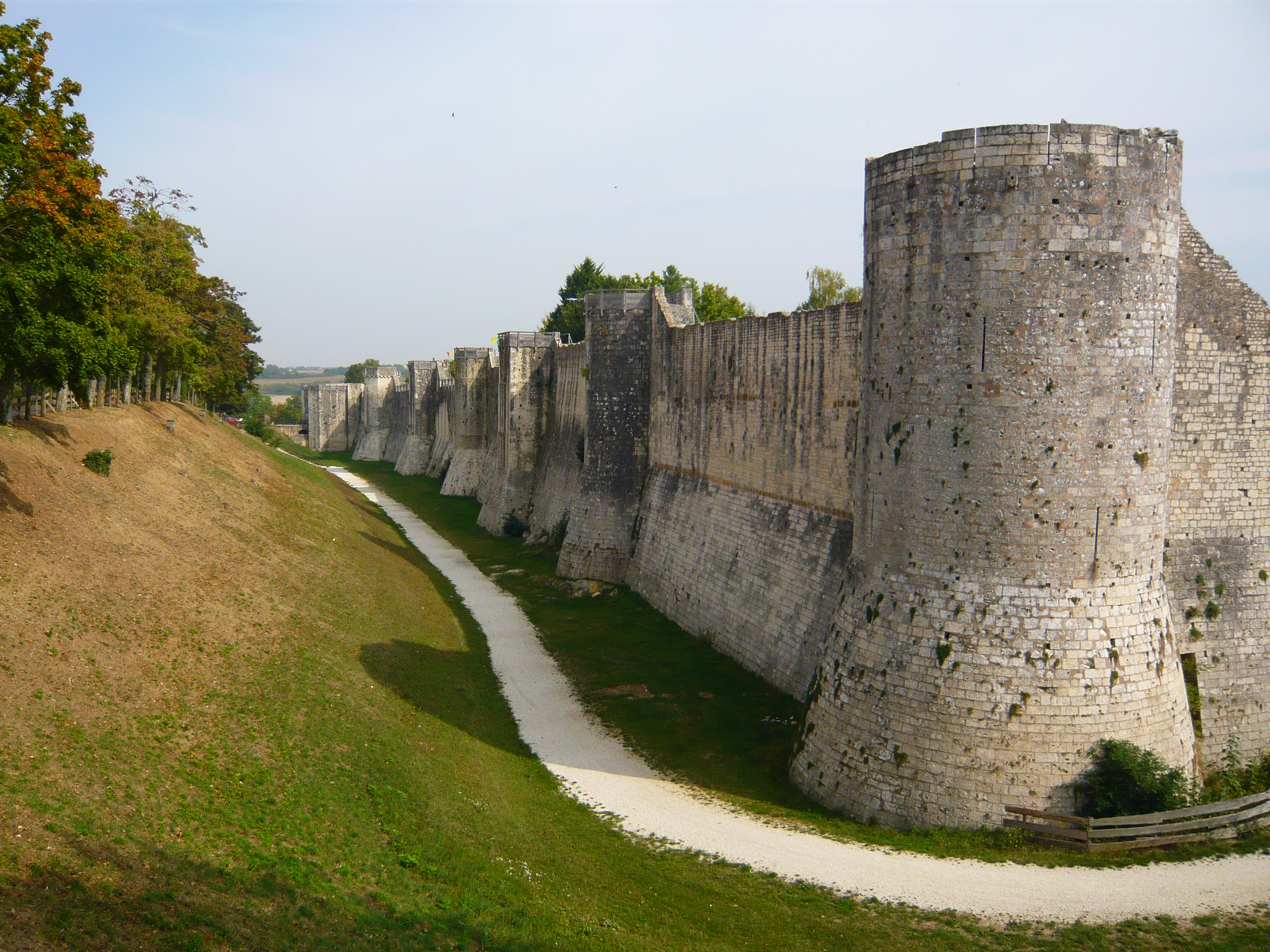 Vue ouest des fortifications de Provins